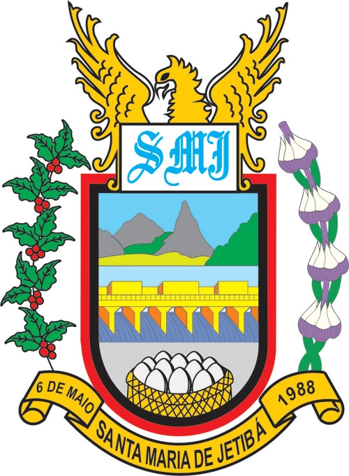 Brasao Do Municipio de Santa Maria de Jetibá